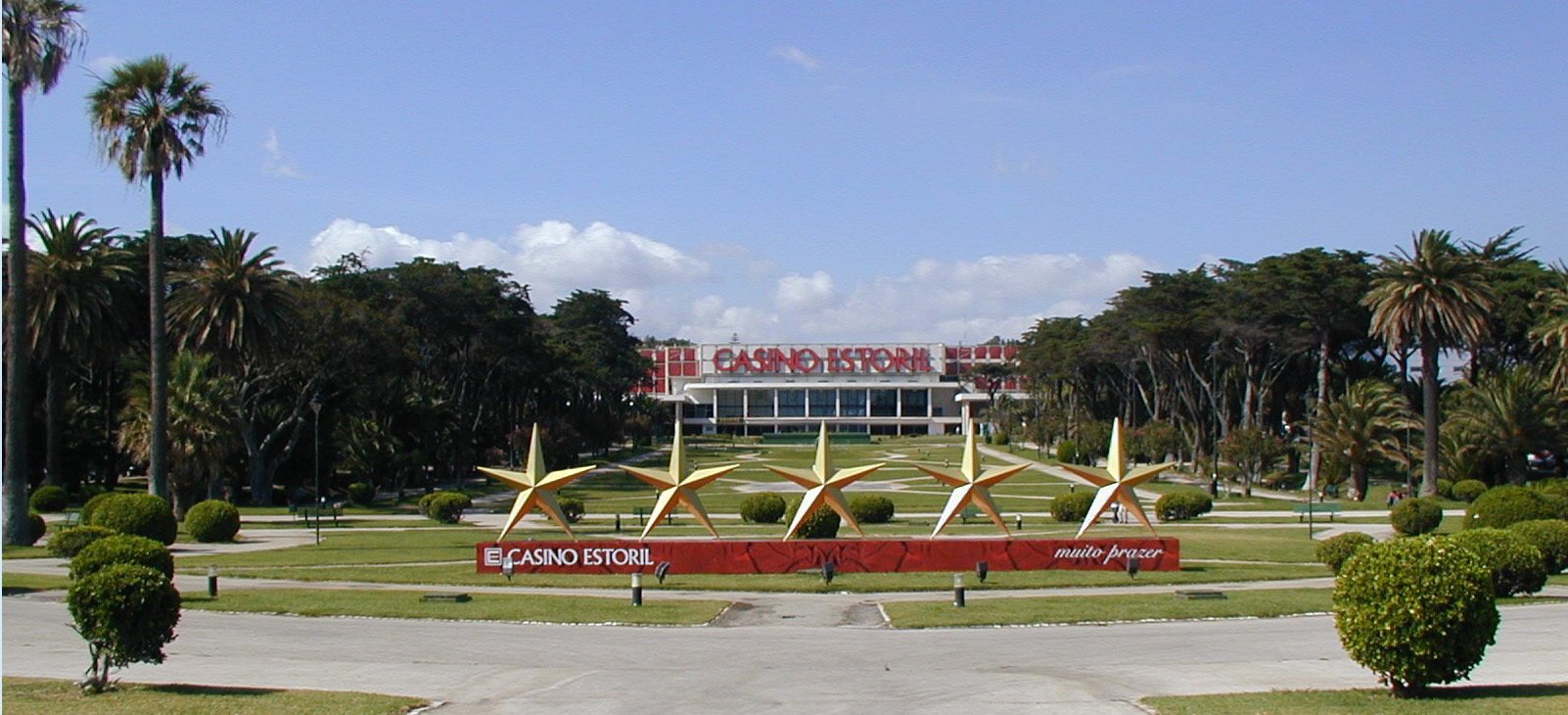 Casino Estoril in Estoril, near Lisbon, Portugal.